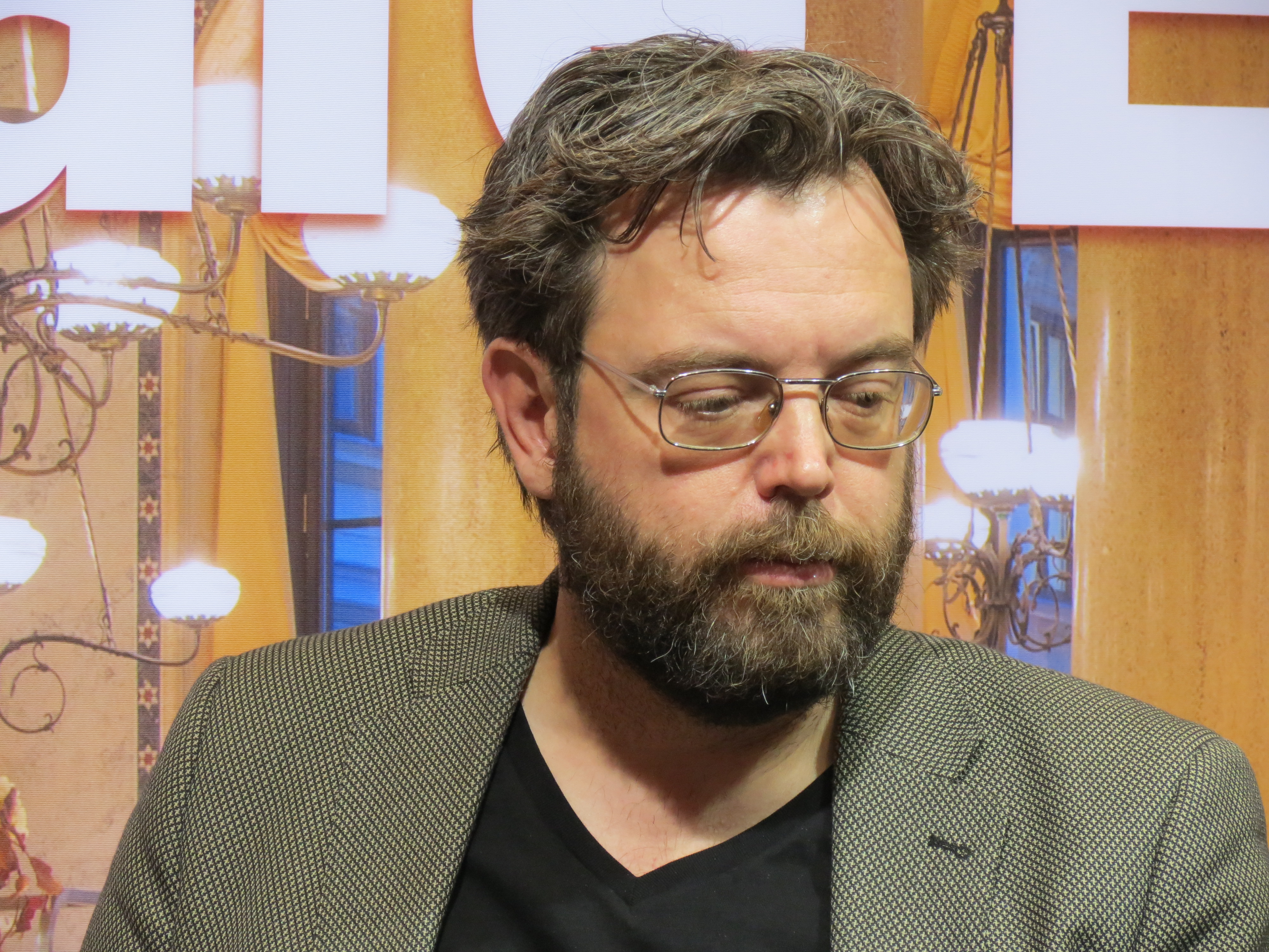 Gunnar Nirstedt, bokförläggare på Bonniers, under en programpunkt på Bokmässan i Göteborg 2014.